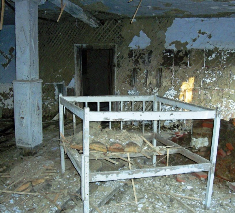 Laufstall oder Kinderbett im Kindergarten von Dolgij